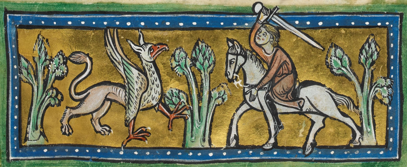 Griffin - detail of a miniature from the Rochester Bestiary, BL Royal 12 F xiii